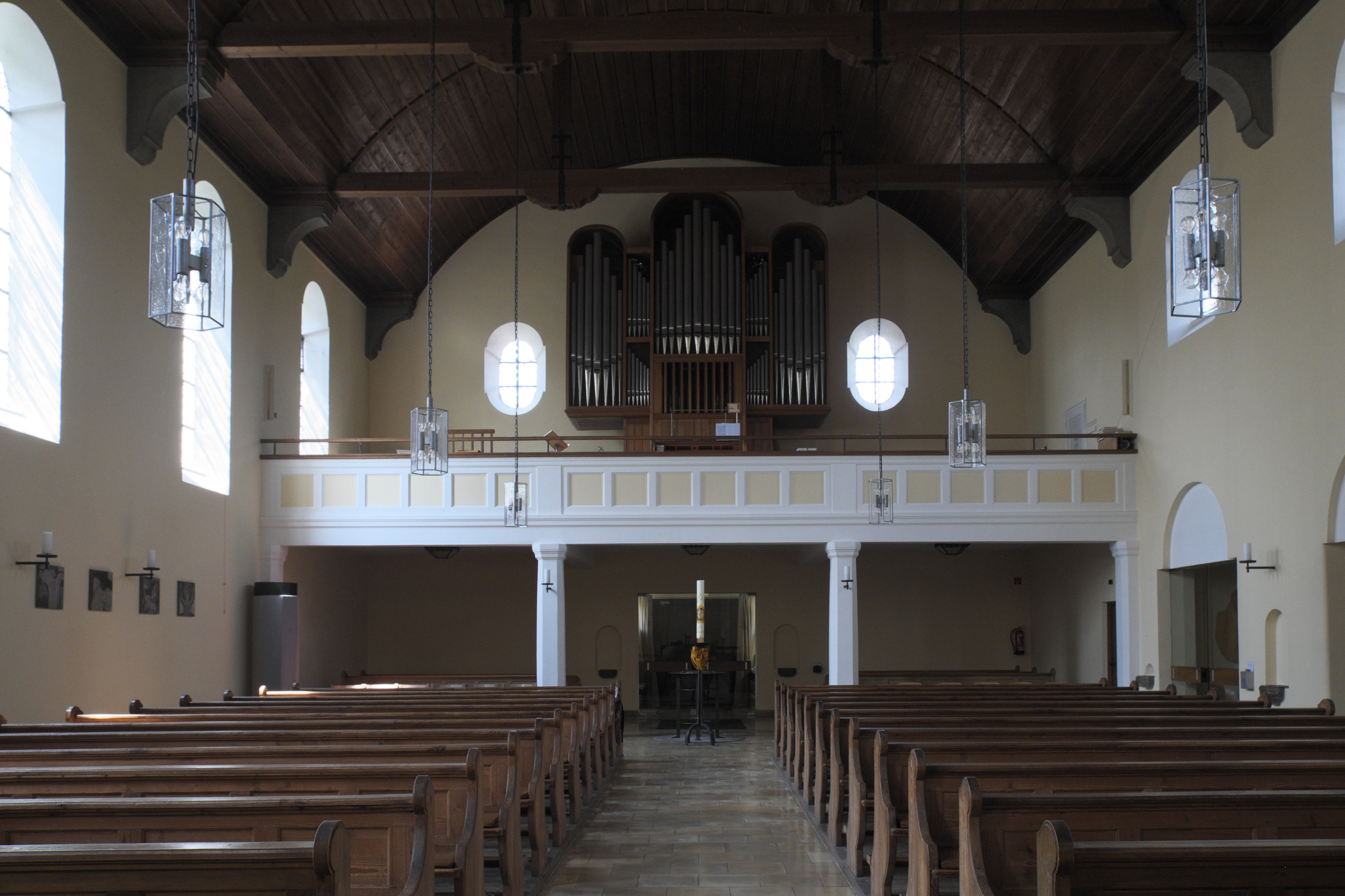 Katholische Pfarrkirche Zu den Heiligen Schutzengeln in Eichenau im Landkreis Fürstenfeldbruck (Bayern/Deutschland), Innenraum